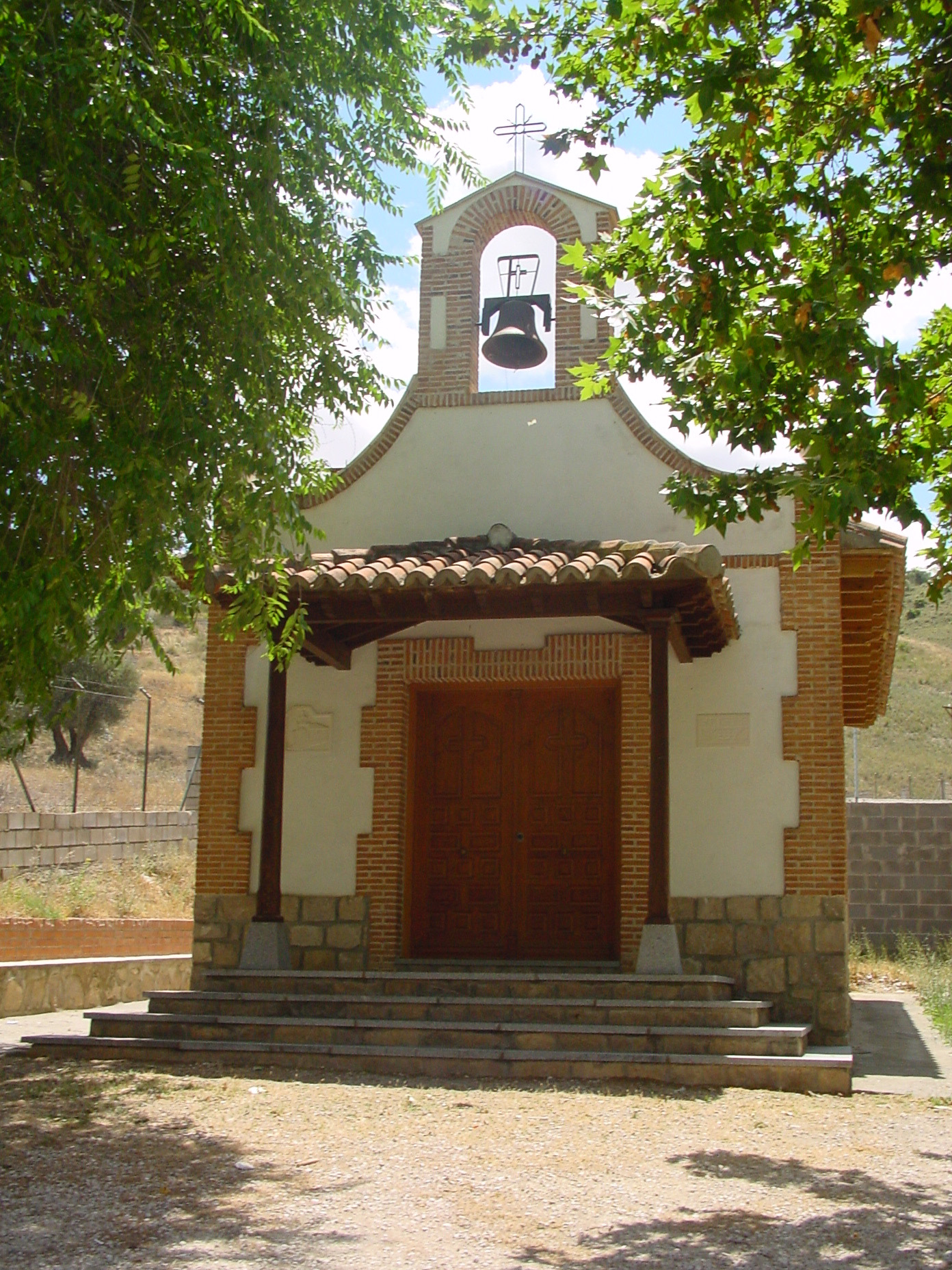 Ermita de San Isidro en Tielmes.